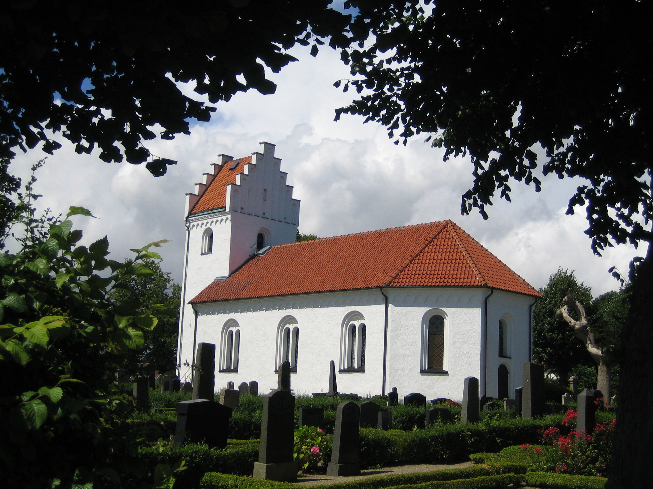 Hammenhögs kyrka